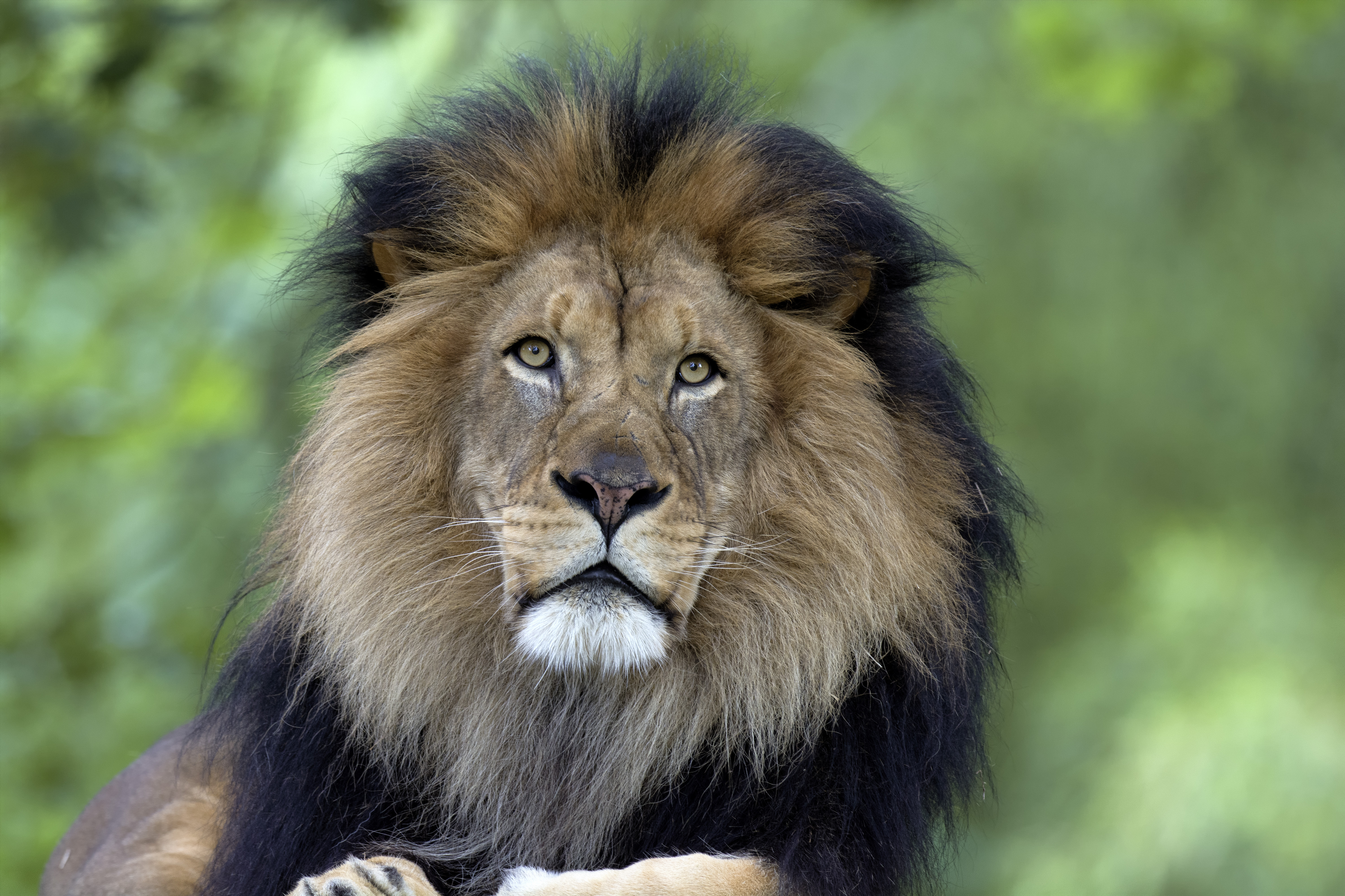 lion